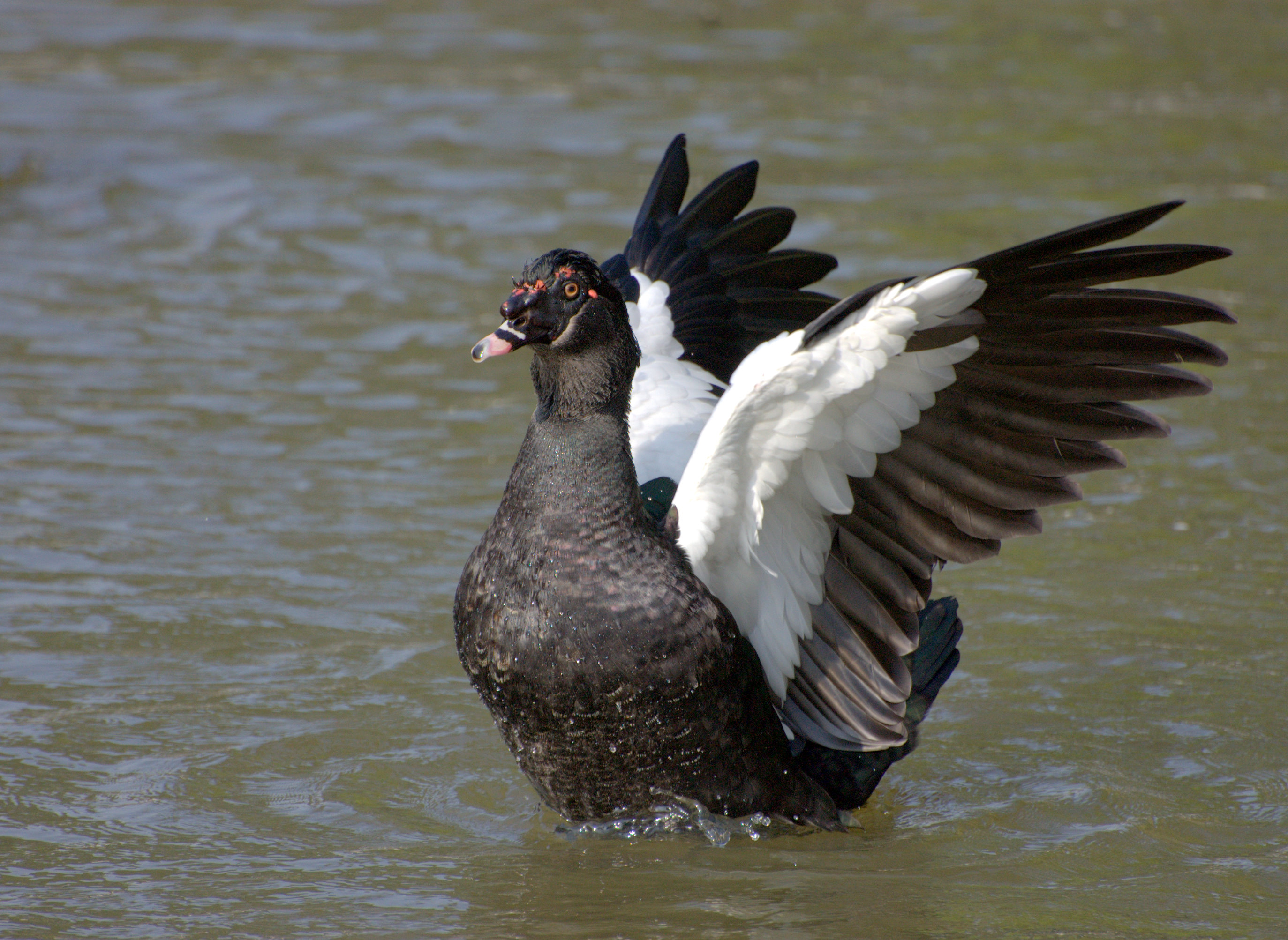 Wild Cairina moschata, Horto Florestal de São Paulo - Capital - Brasil